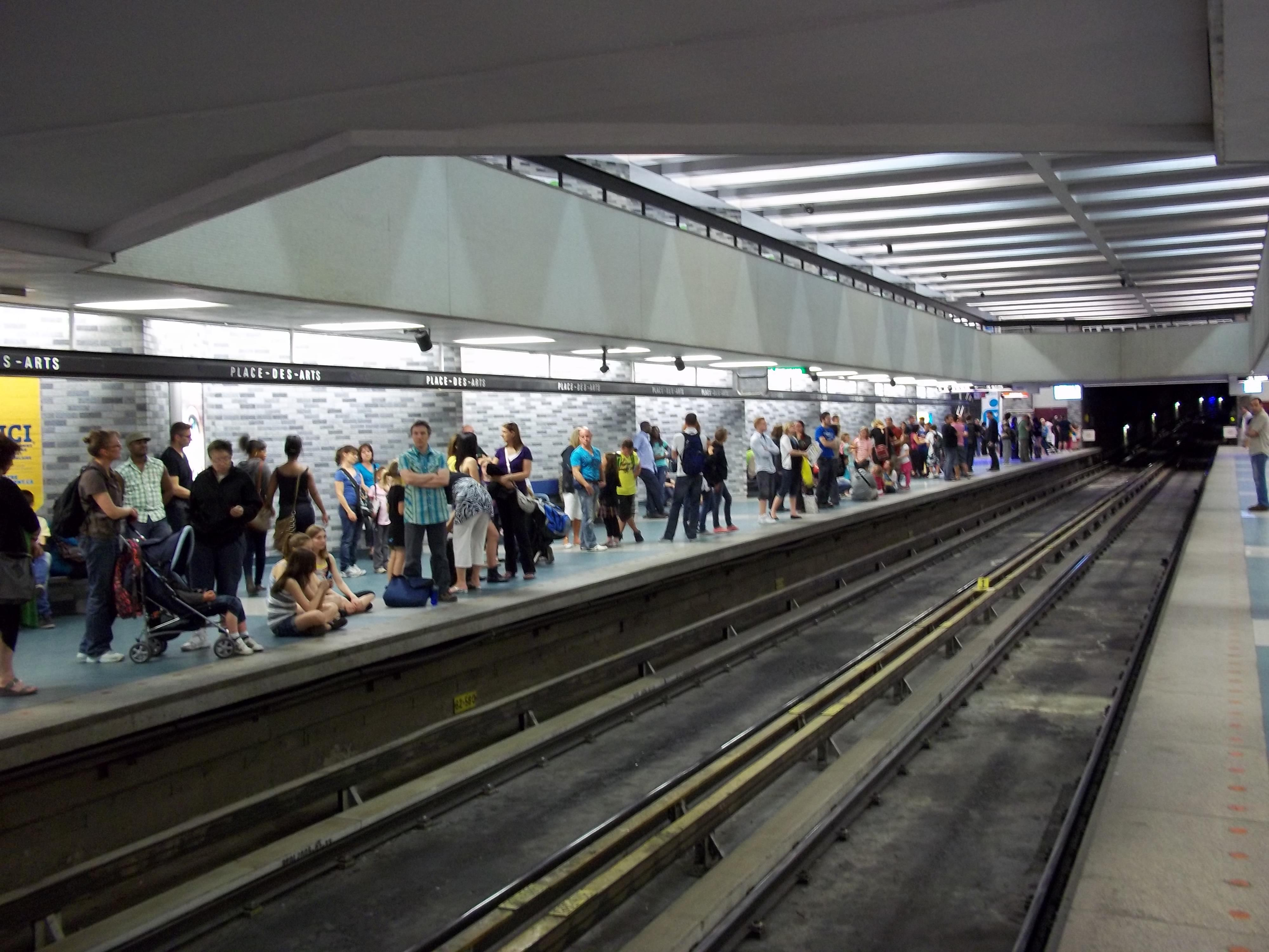 Quai de la station de métro Place-des-Arts, Montréal